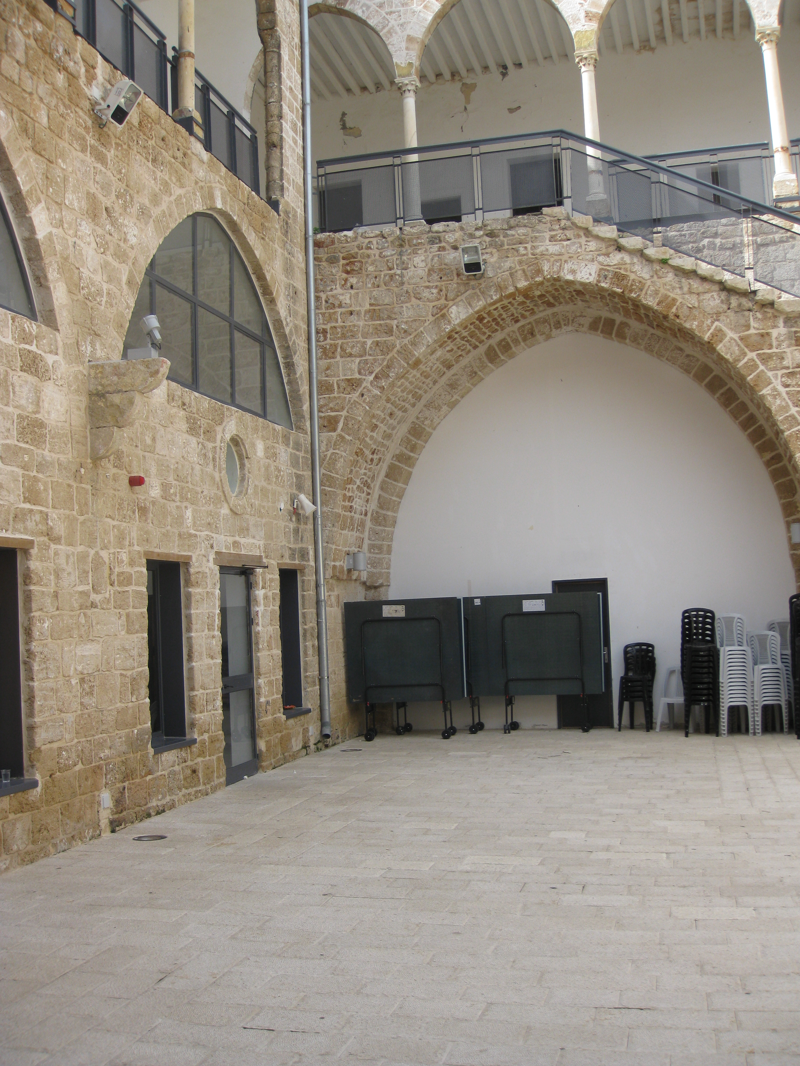 Acco (Acre, Akko) - Akko Saray Building. Today - a caltural centre עכו בית הסאריה של עכו. כיום מרכז תרבות.